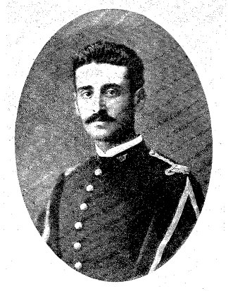 Fotografía aparecida en el artículo "Los héroes de Baler", publicado en la revista Blanco y Negro de Madrid el 20 de mayo de 1899. El pie de foto dice: Comandante Las Morenas.